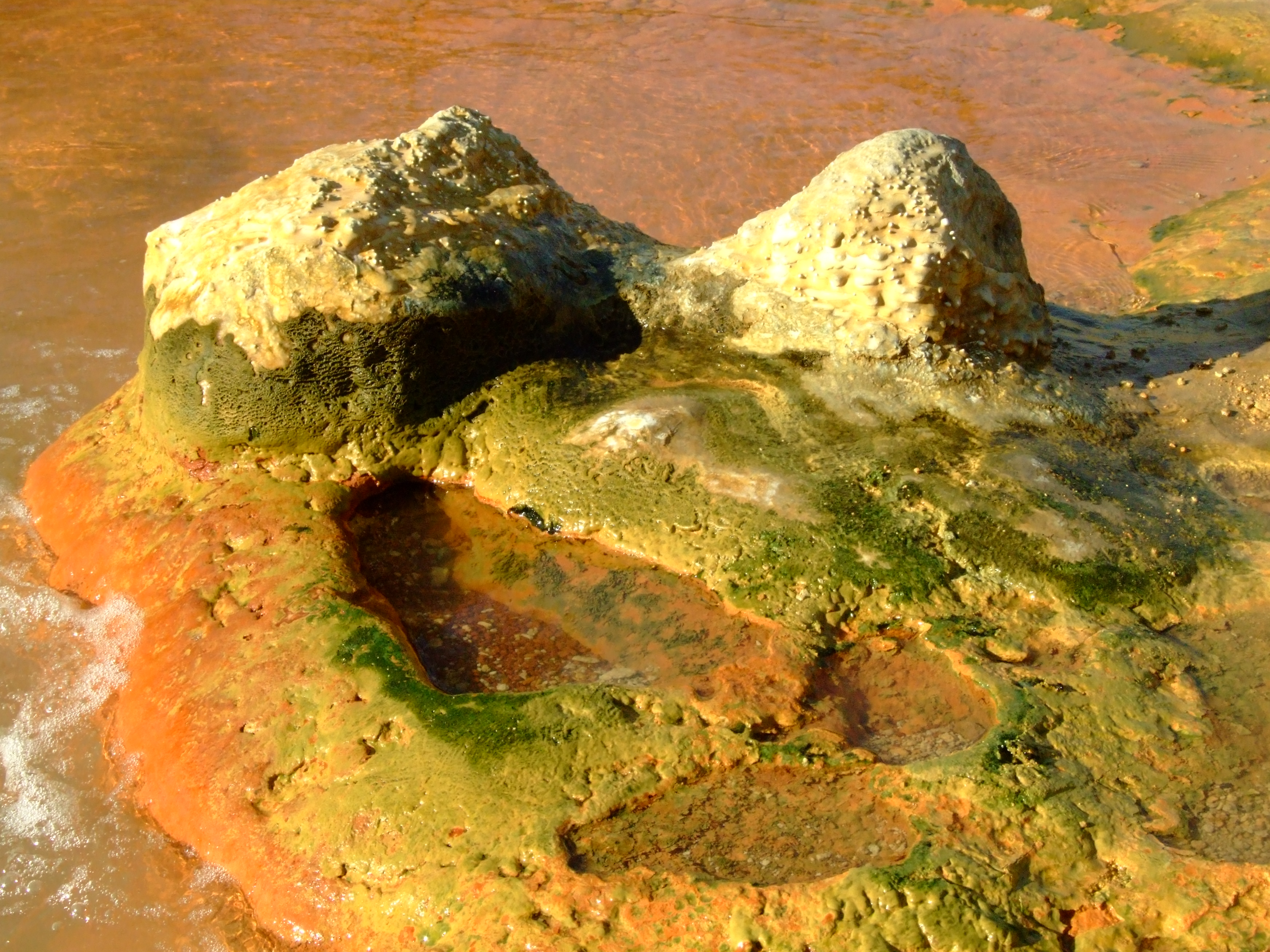 «Ջերմուկի» աղբյուրներ 1